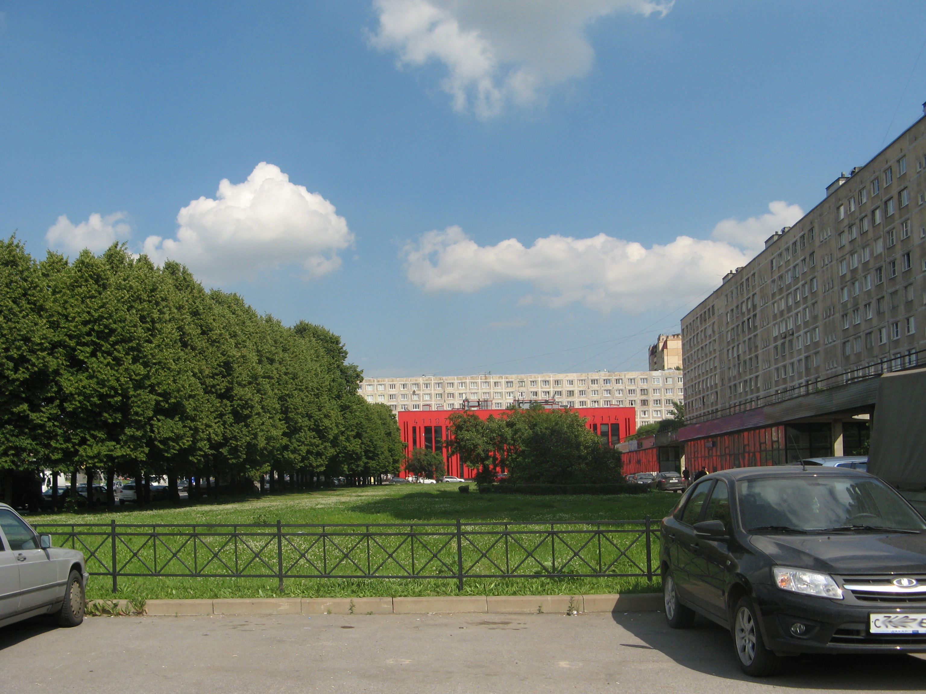 Народная улица у дома 1, Санкт-Петербург